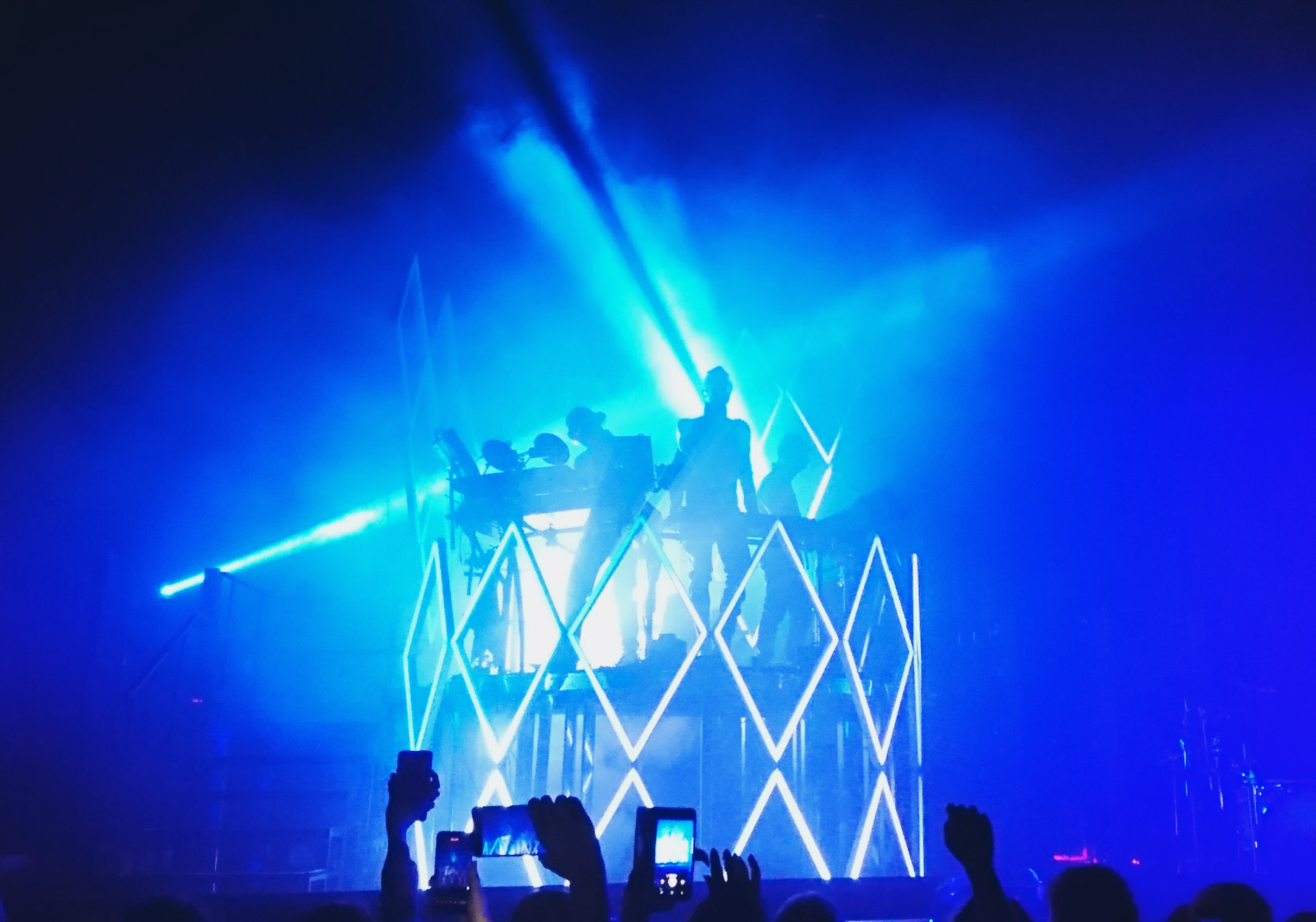 Tokio Hotel performing "Something New" in Berlin on 11/18/2017